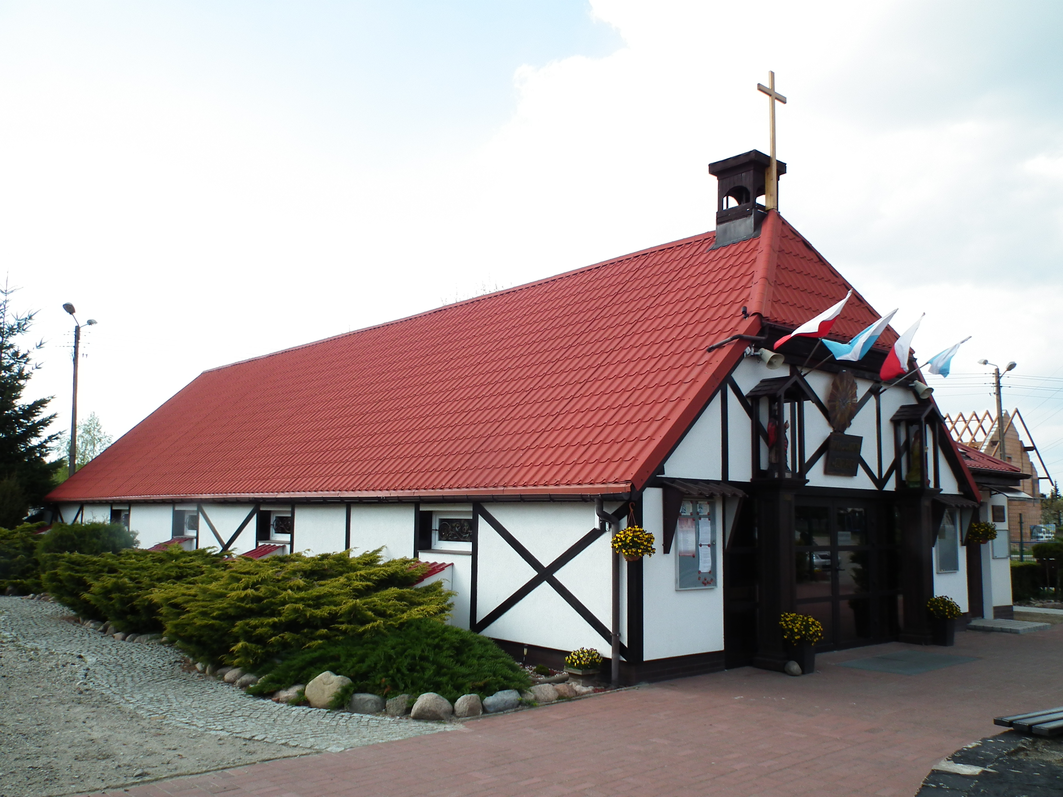 Kaplica i fundamenty niedokończonego kościoła św. Augustyna w Czapurach.